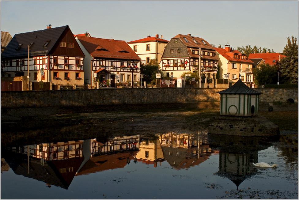 Schönfeld, Schlossteich mit Fachwerkbauten